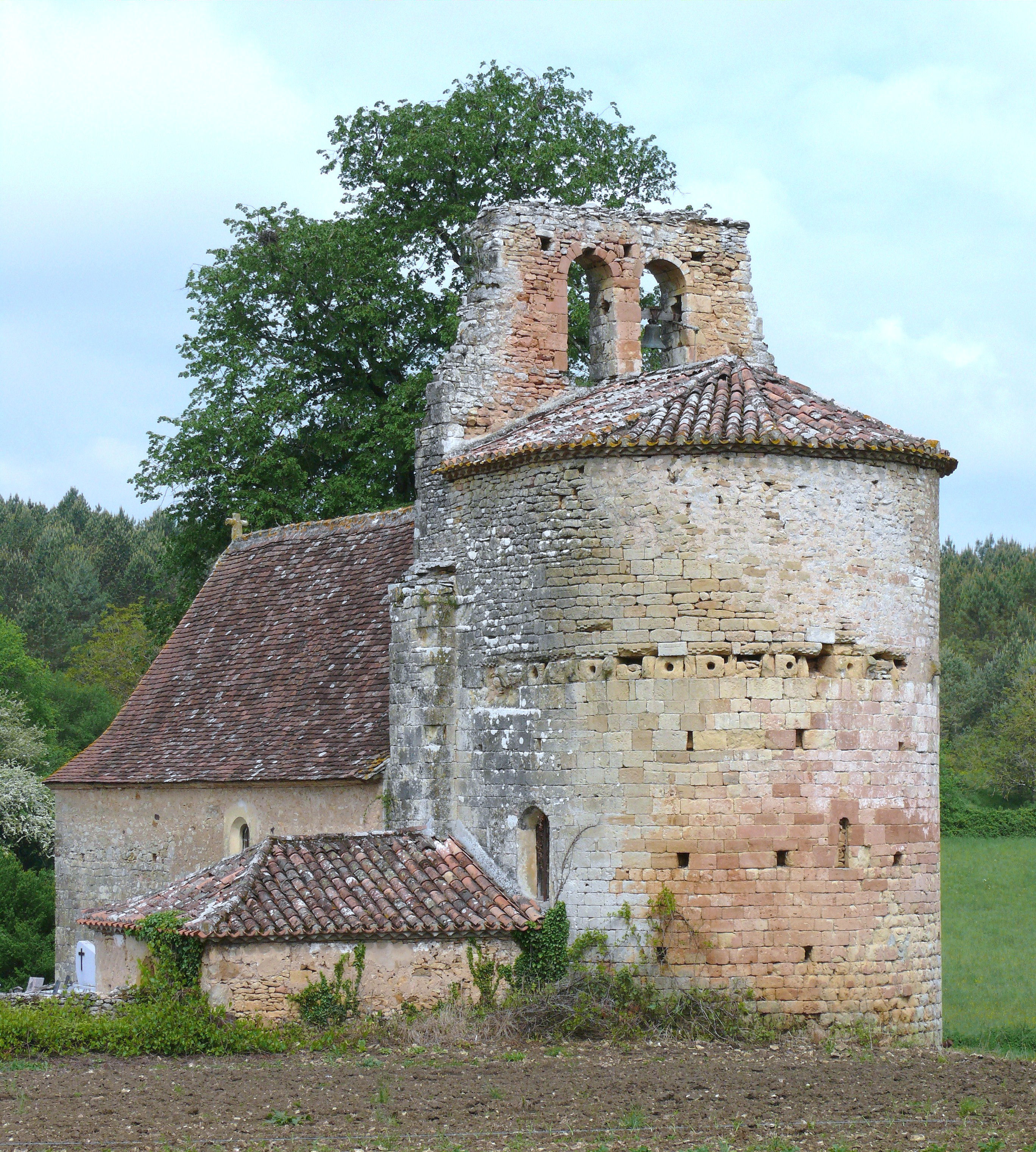 Saint-Marcory - Eglise